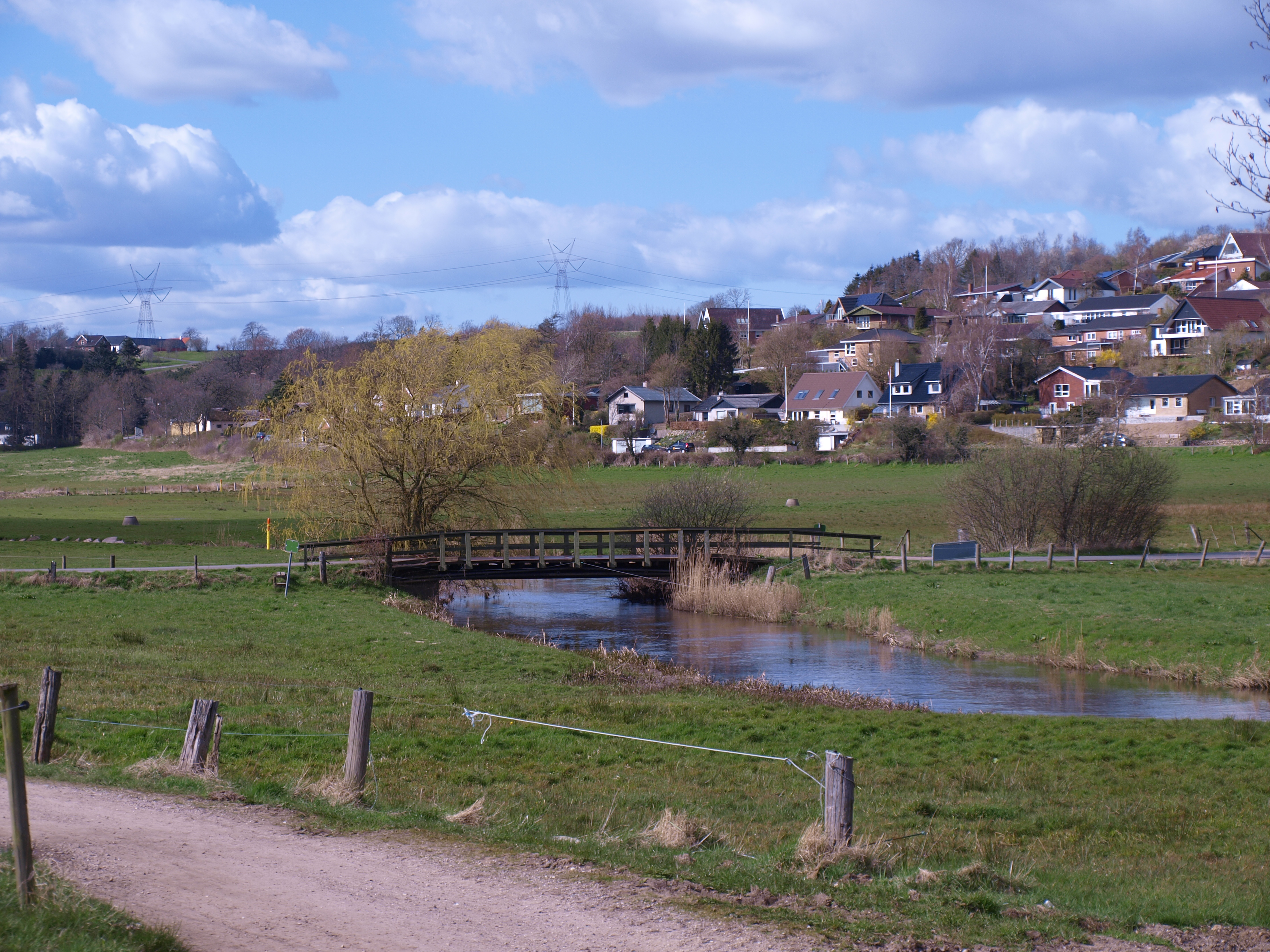 Plovfuren, Kolding Å, 17. april 2015